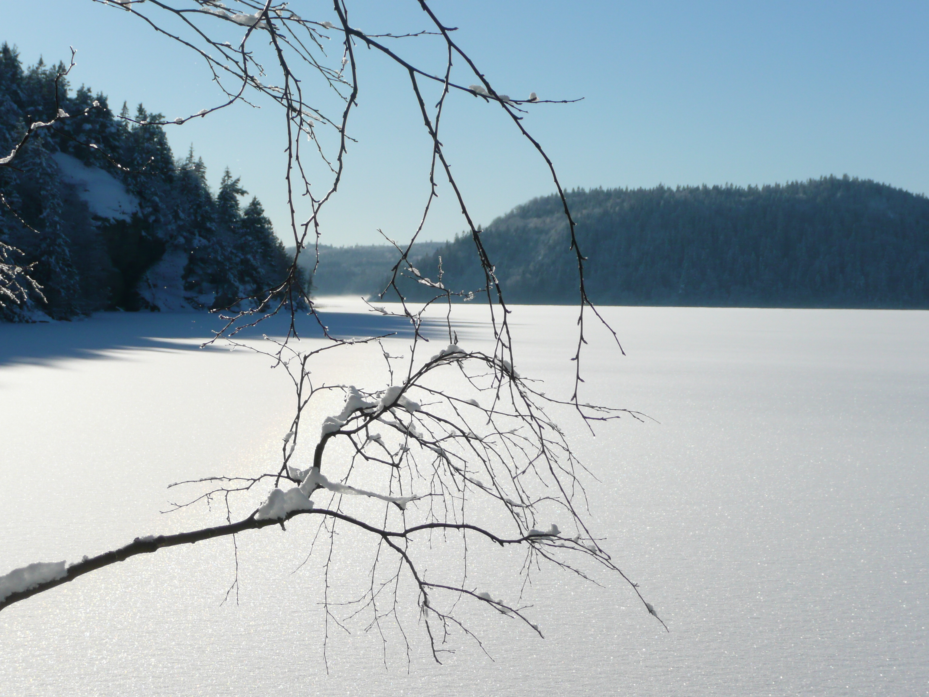 En januaridag vid Stora Hällungen mot sydväst.